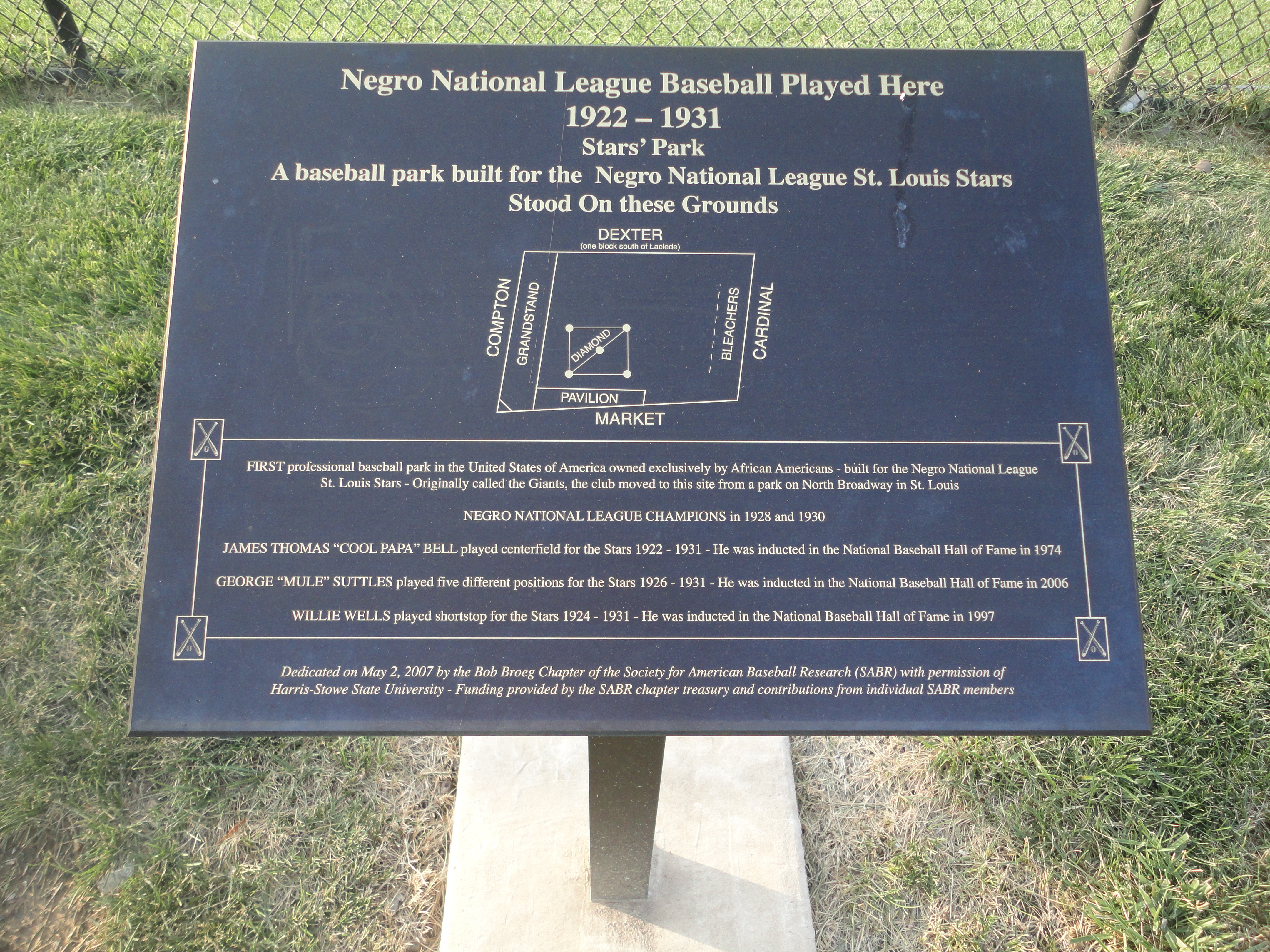 Stars' Park